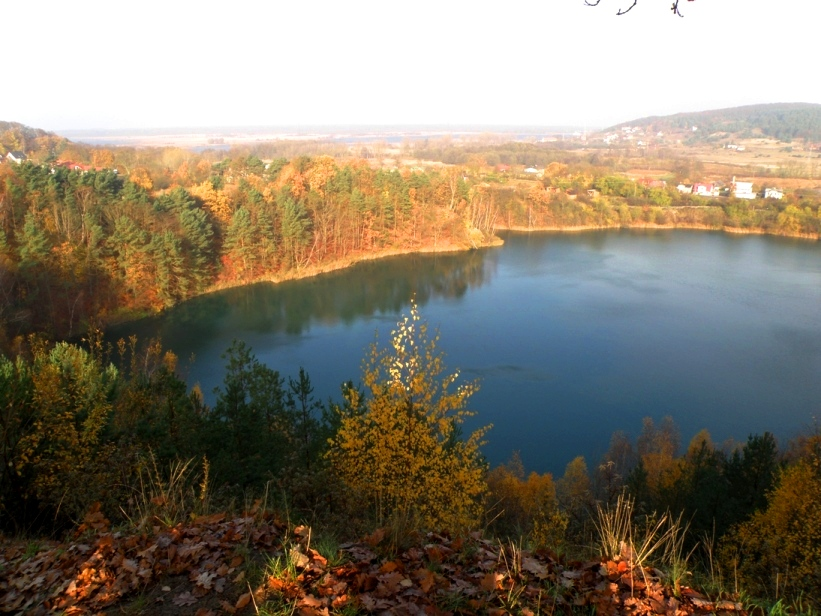 jez. Turkusowe